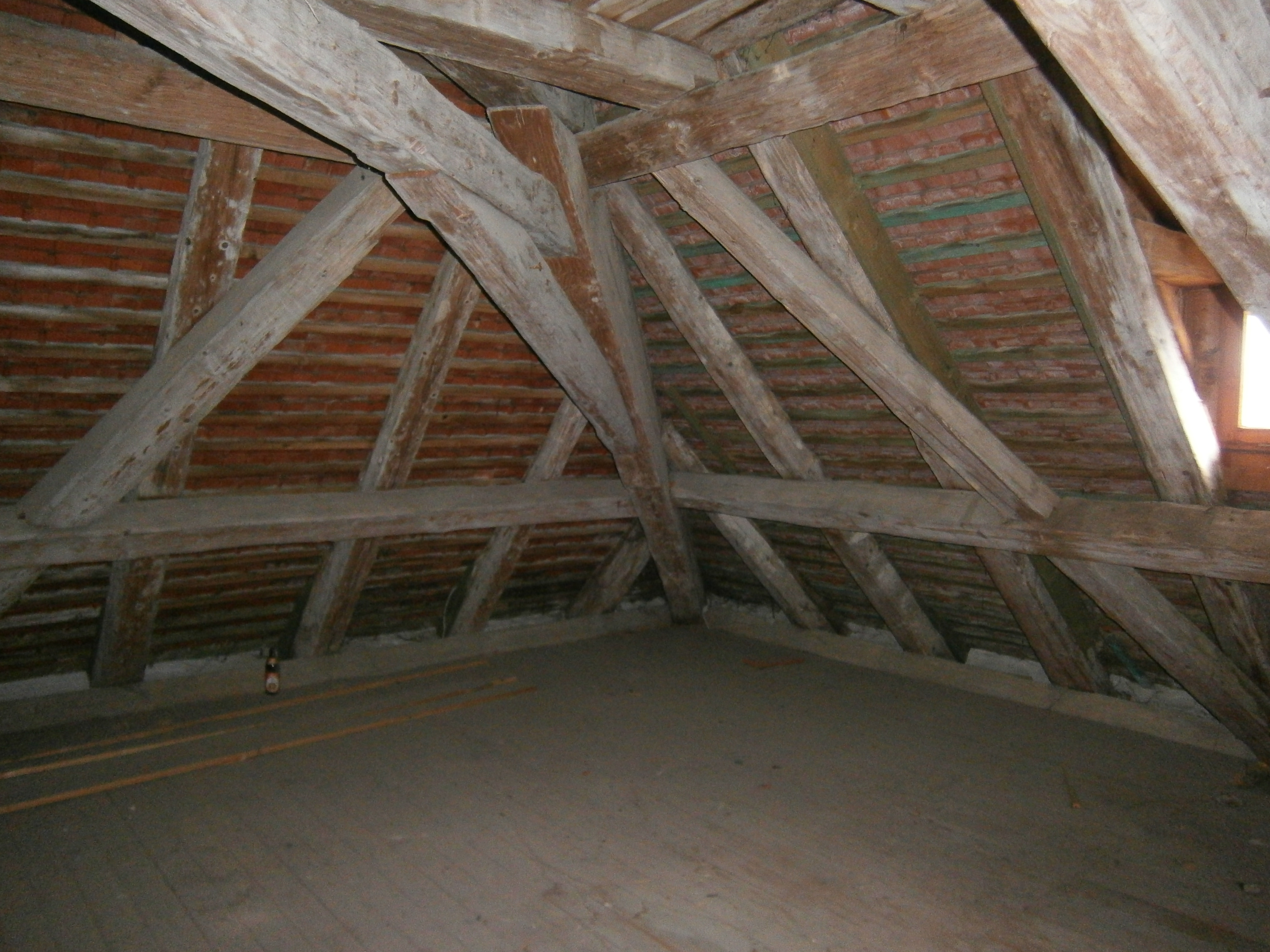 Innenansicht Walmdaches